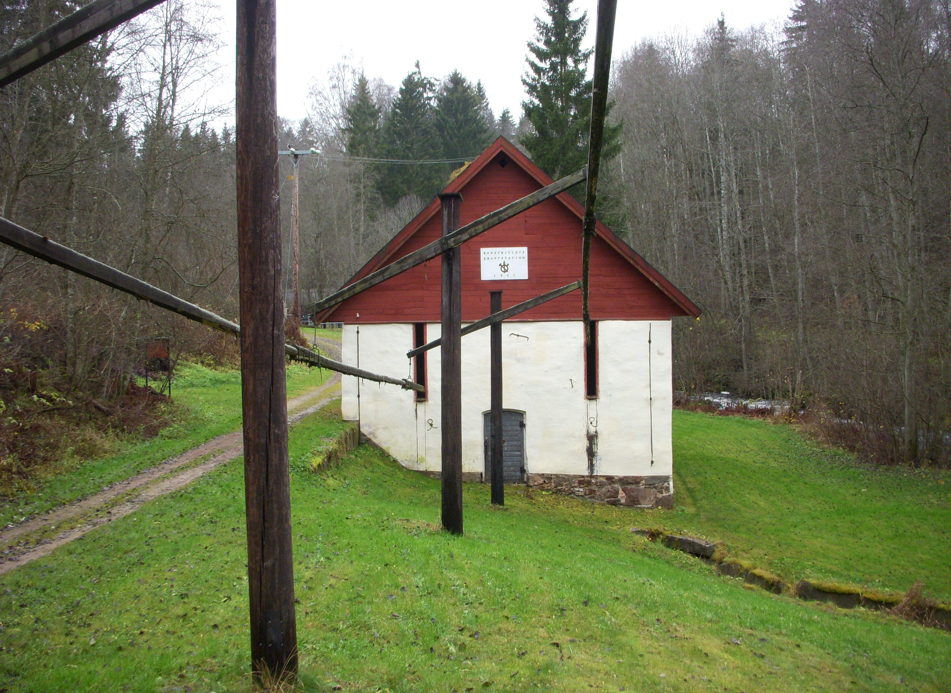 Bispbergs gruva, konstgången i Säterdalen